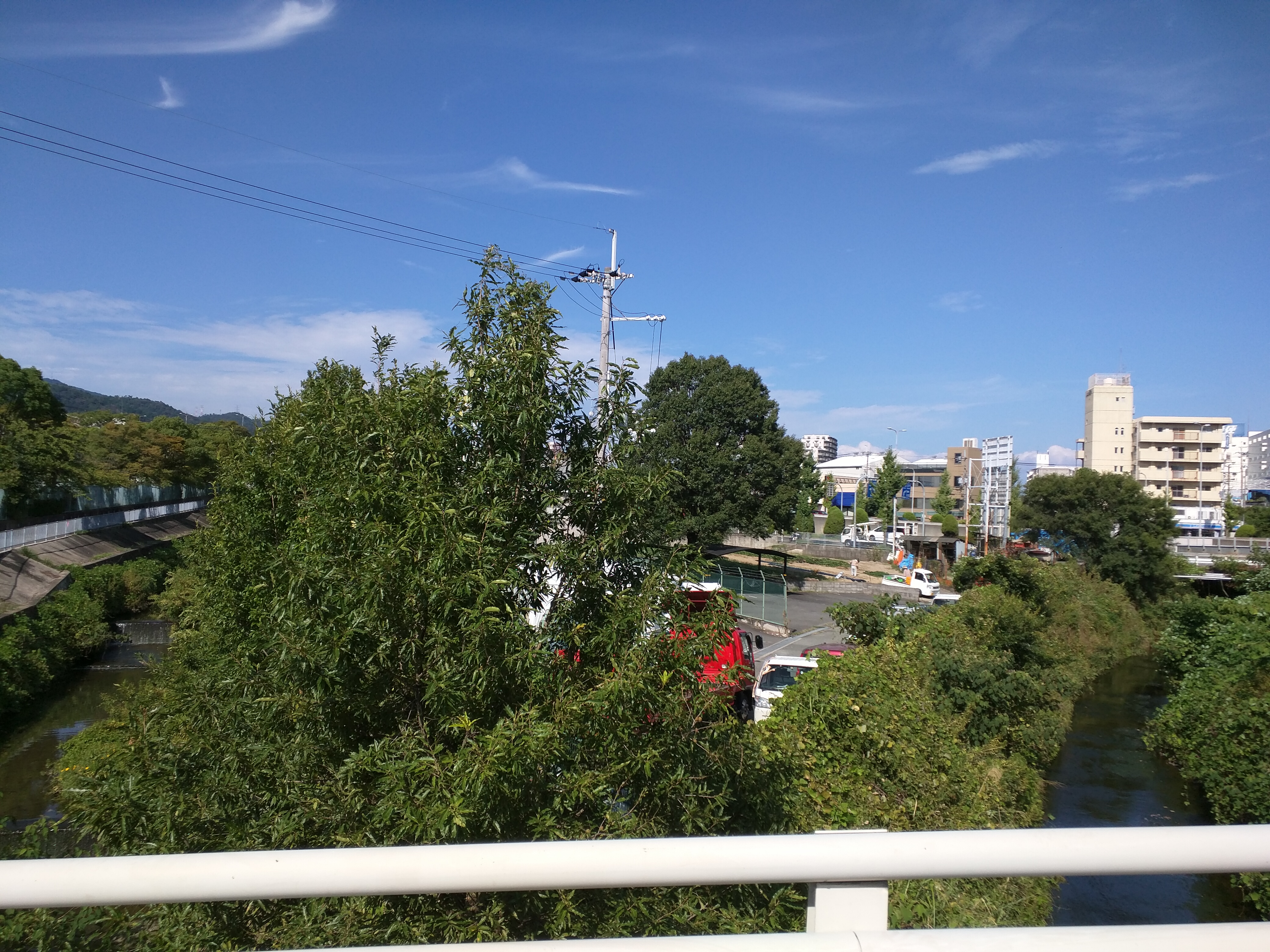 Wikipedia:芋川（大阪府）藤原橋付近